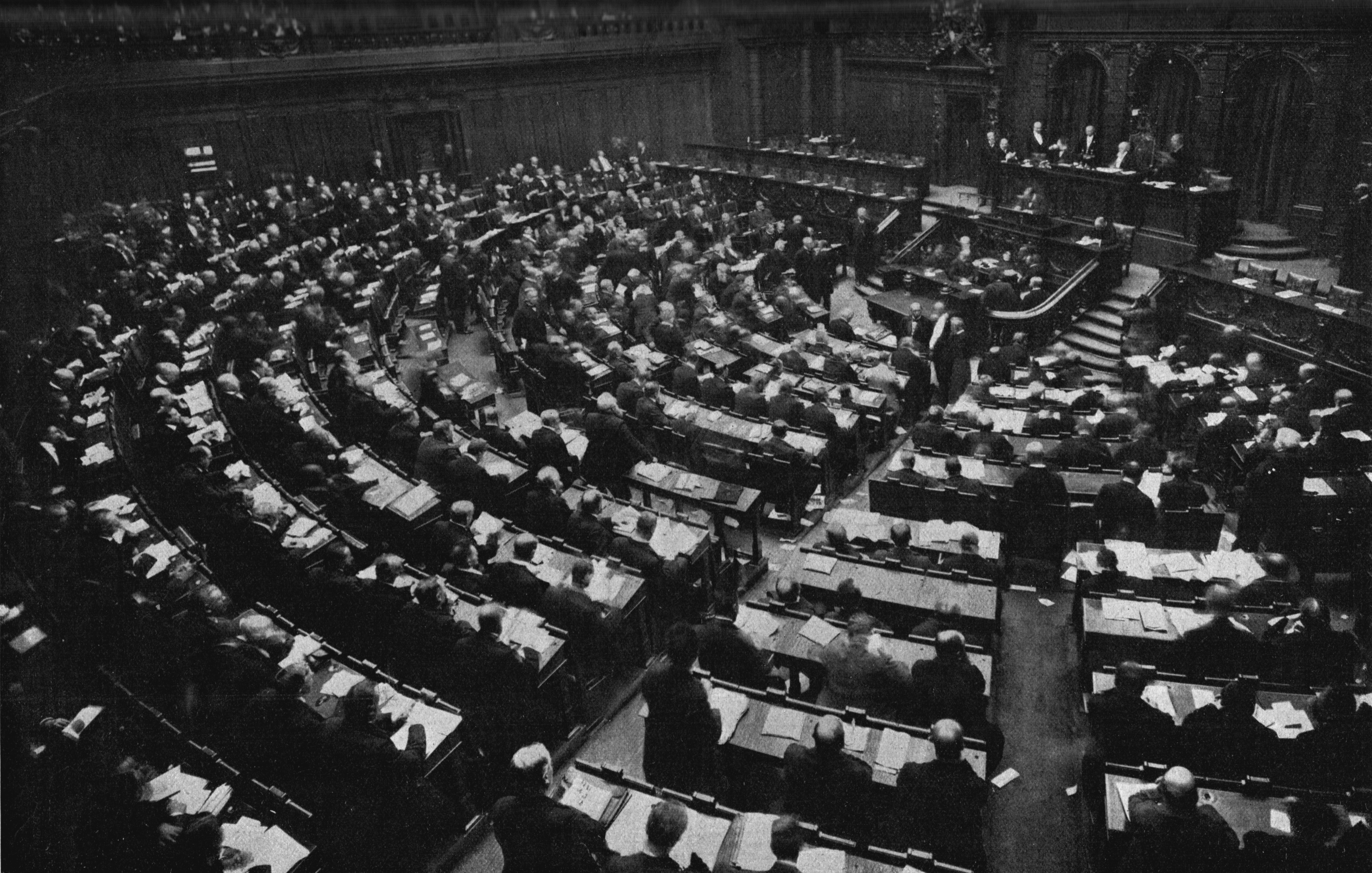 Apertura del nuevo "Reichstag" en 1912, después de las últimas elecciones realizadas antes de la Primera Guerra Mundial, que resultaron en un fuerte incremento de los escaños socialdemócratas